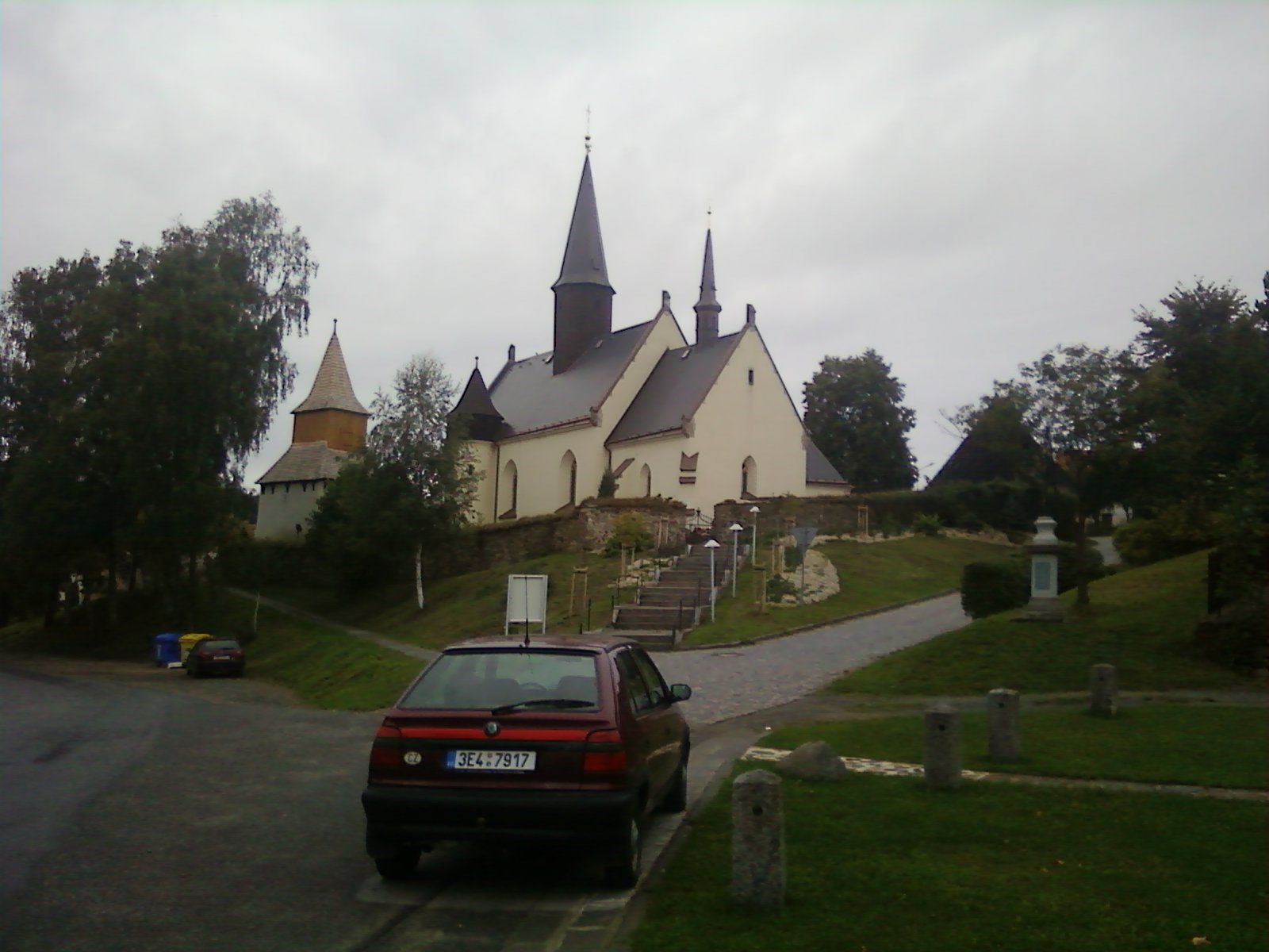 Kostel sv. Petra a Pavla v Korouhvi